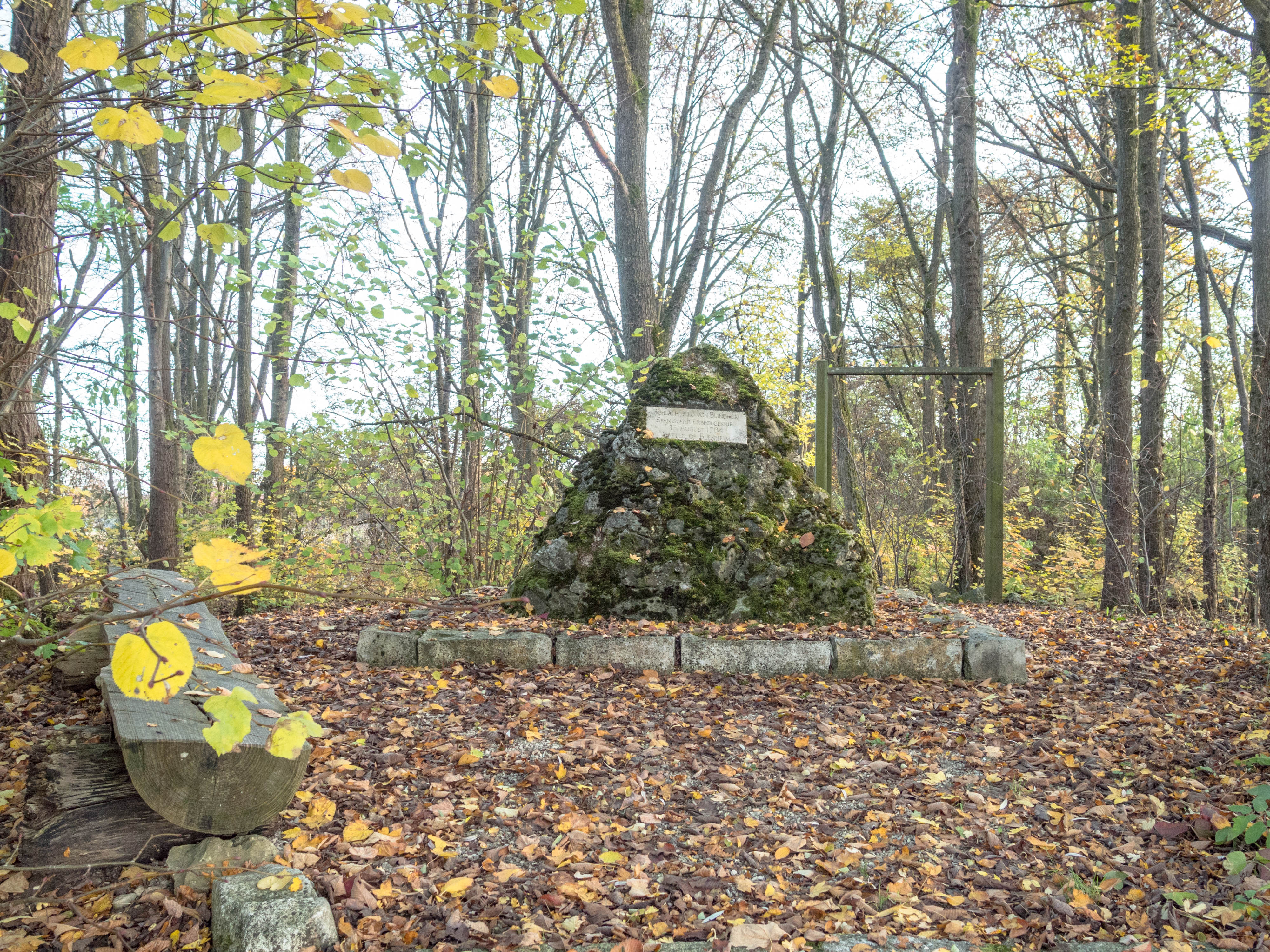 Denkmal zum Gedenken an die Schlacht bei Höchstadt von 1704 (Battle of Blenheim), von Norden. Baudenkmal D-7-73-119-15This is a photograph of an architectural monument.